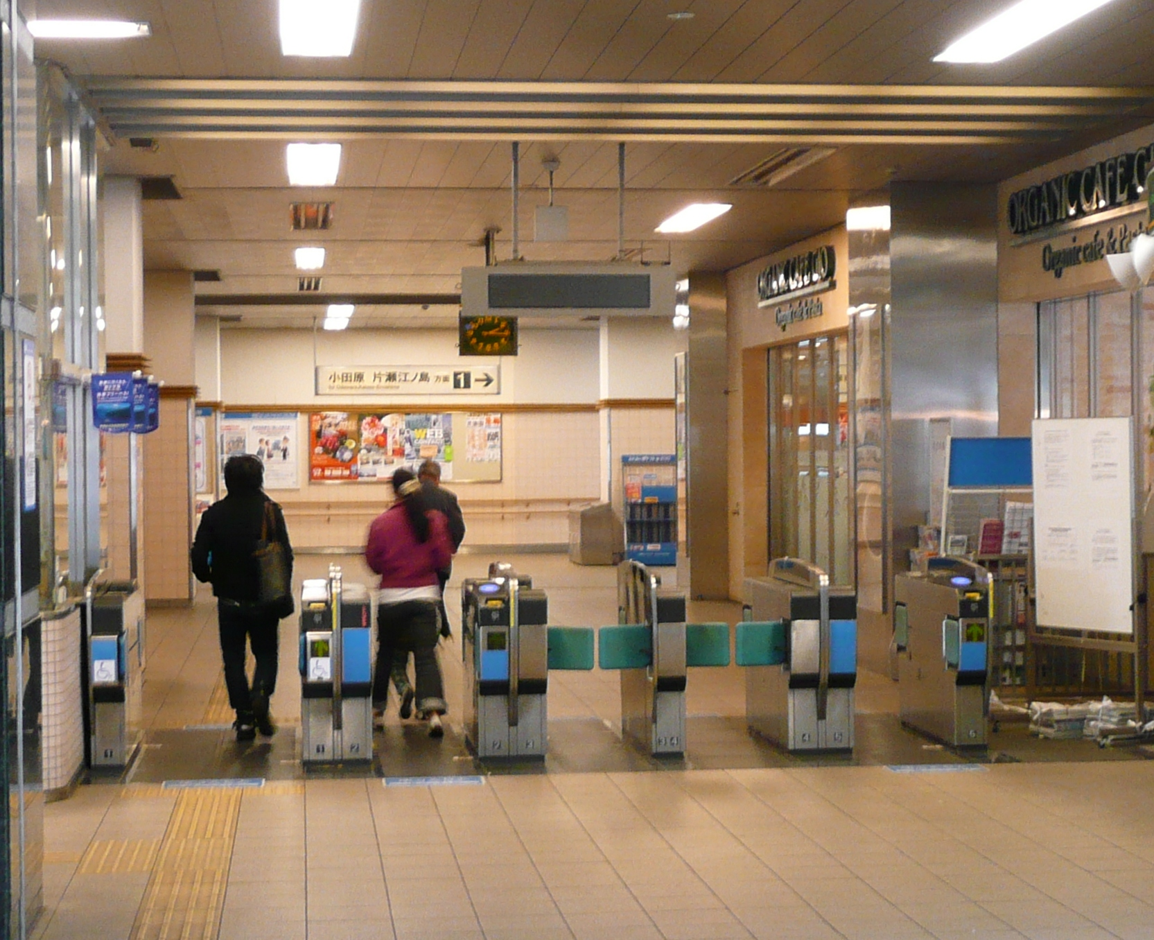 梅ヶ丘駅改札口